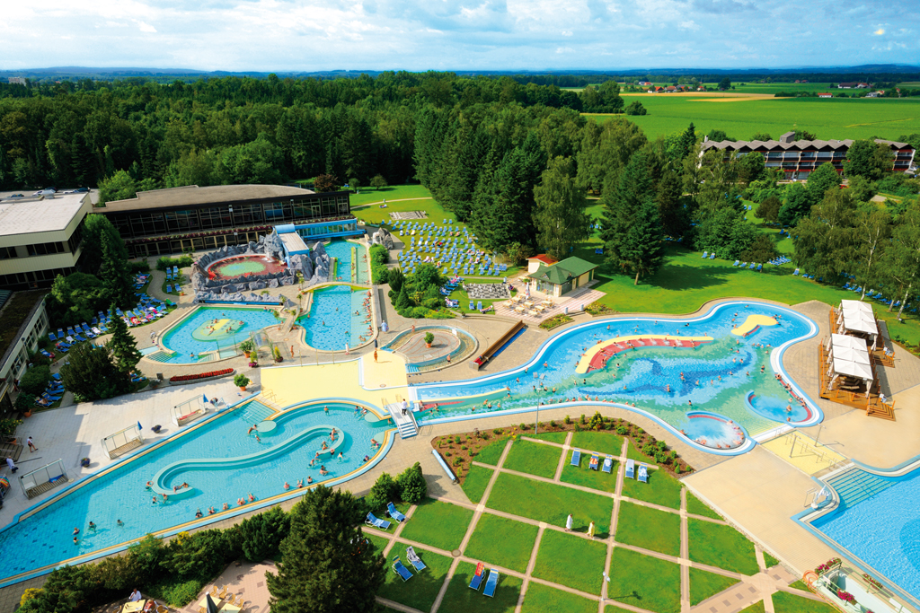 Luftansicht